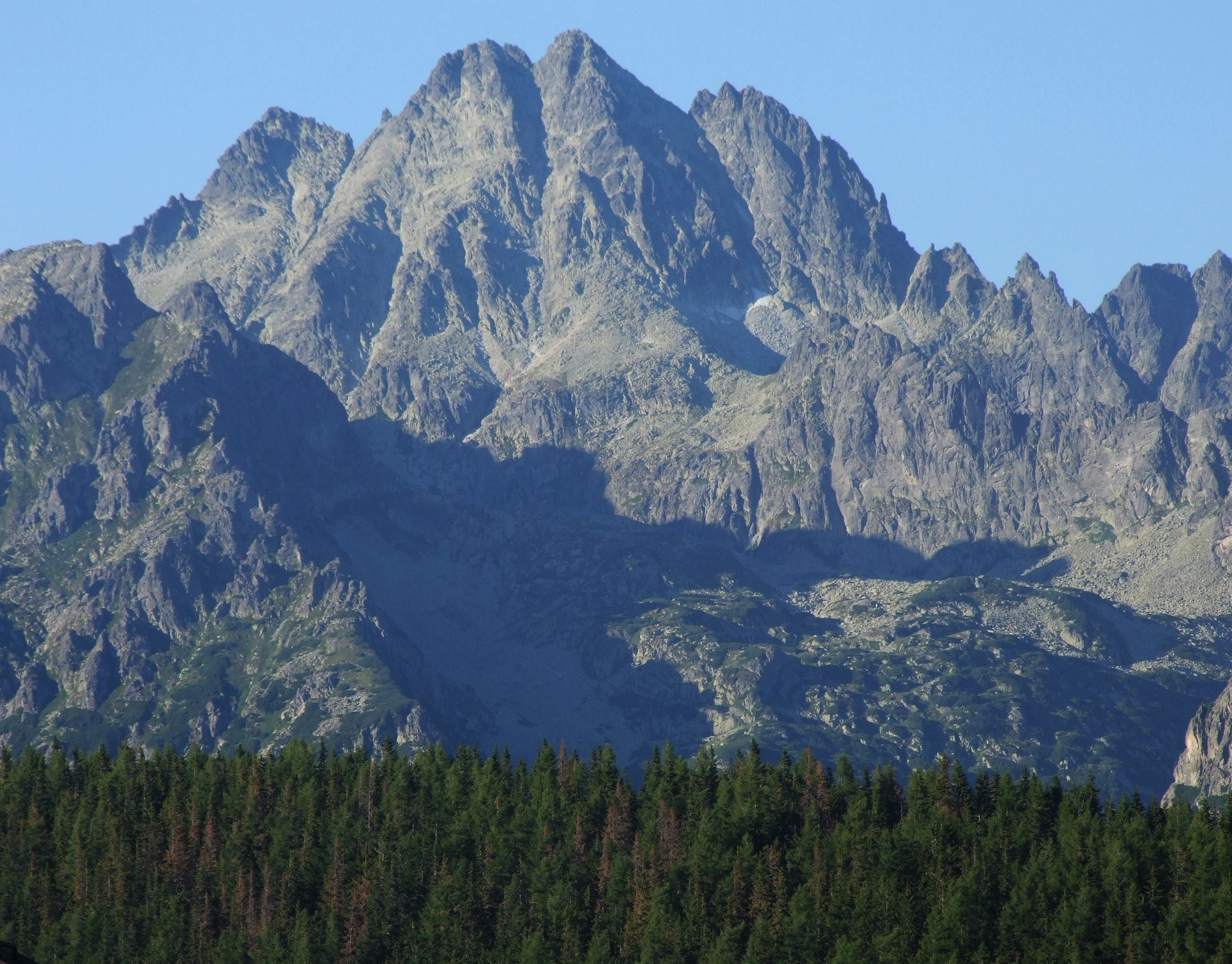 U góry od lewej: Ciężki Szczyt, Wysoka, Smoczy Szczyt. Widok z Szczyrbskiego Jeziora